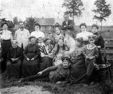 Сям’я чыгуначніка Антоненкі, ст. Талька, пач. 20 ст.